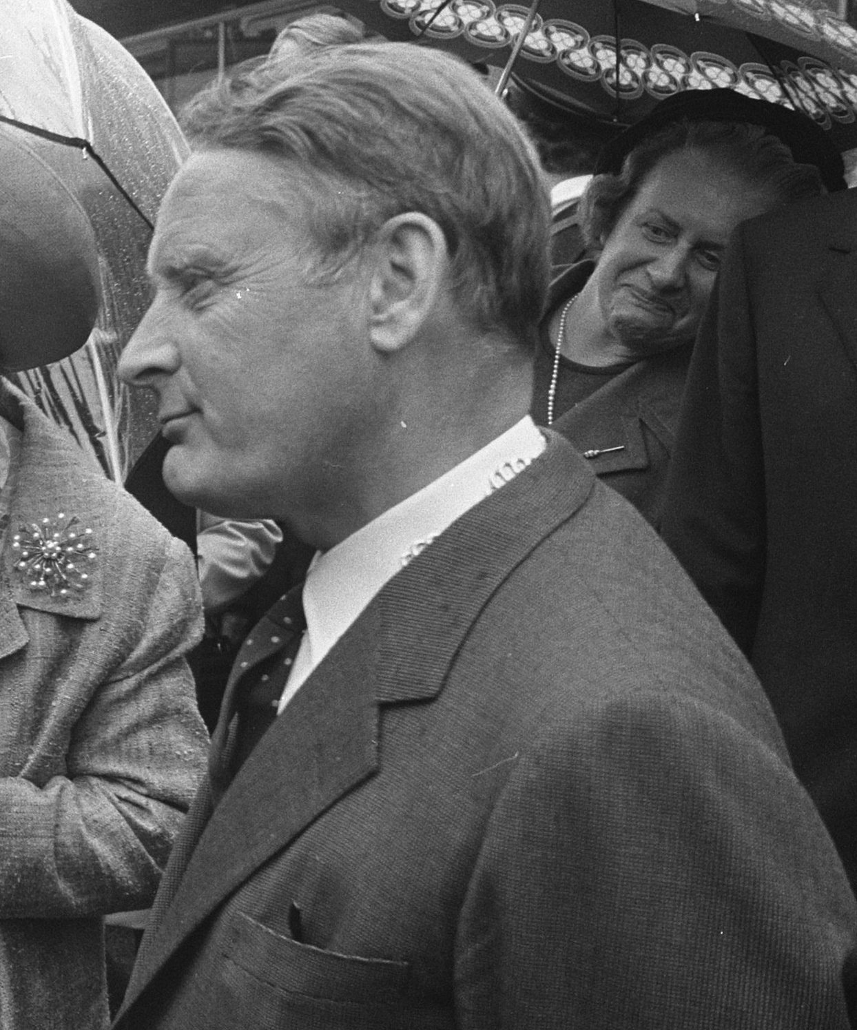 koningin Juliana krijgt een speelgoed-aap